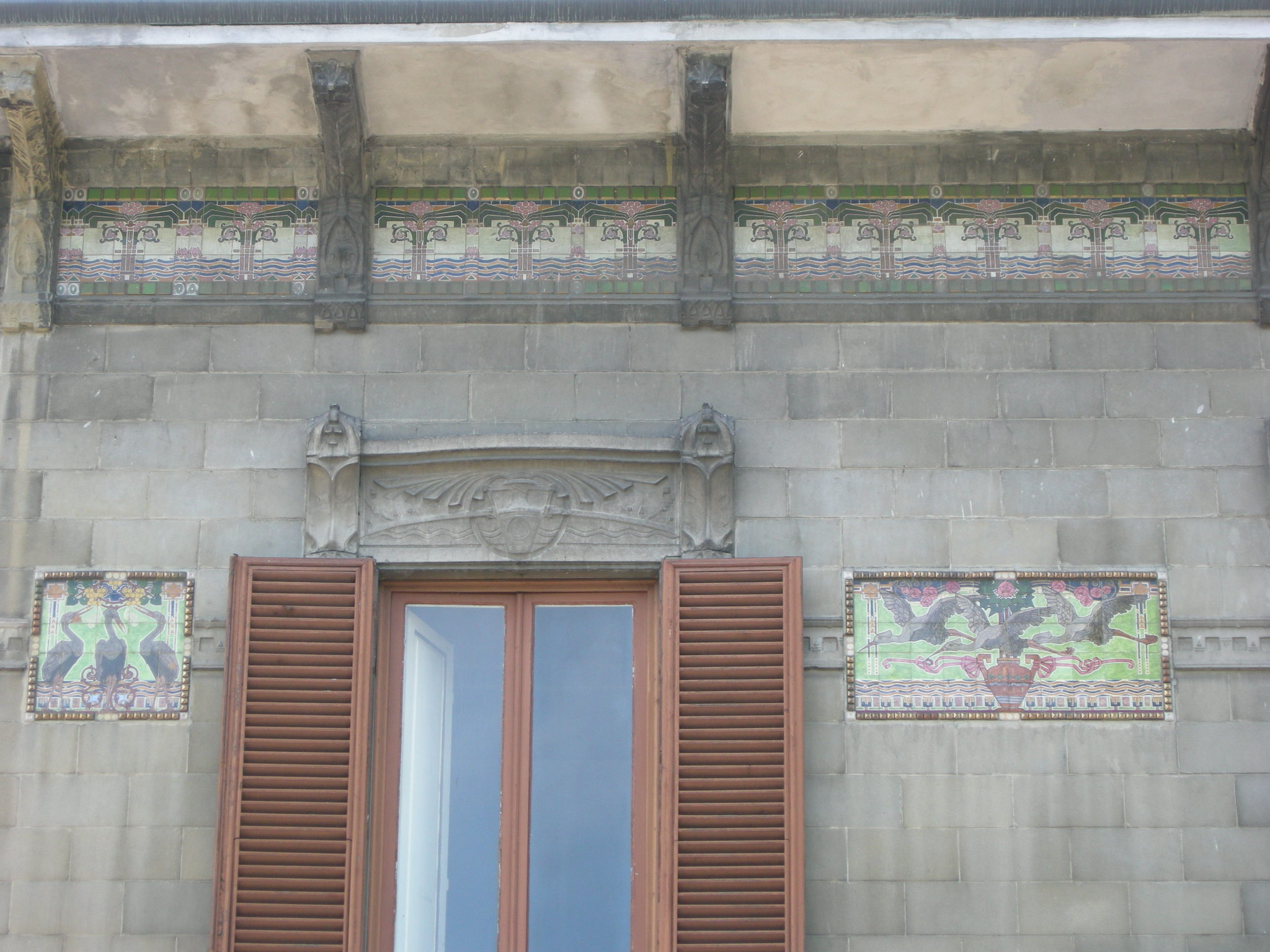 Villa Gioiosa, dettaglio